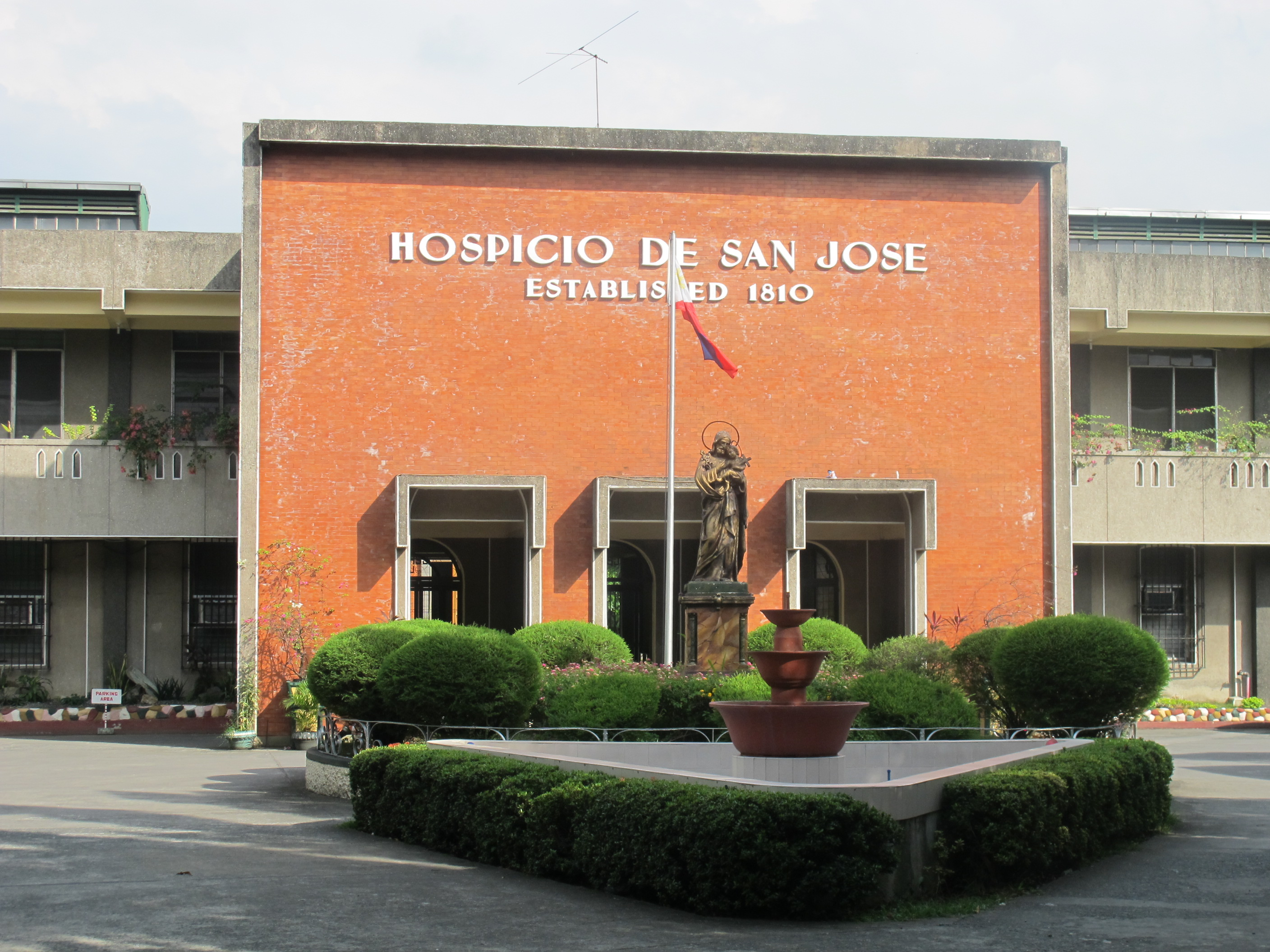 Hospicio de San Jose in Manila, Philippines